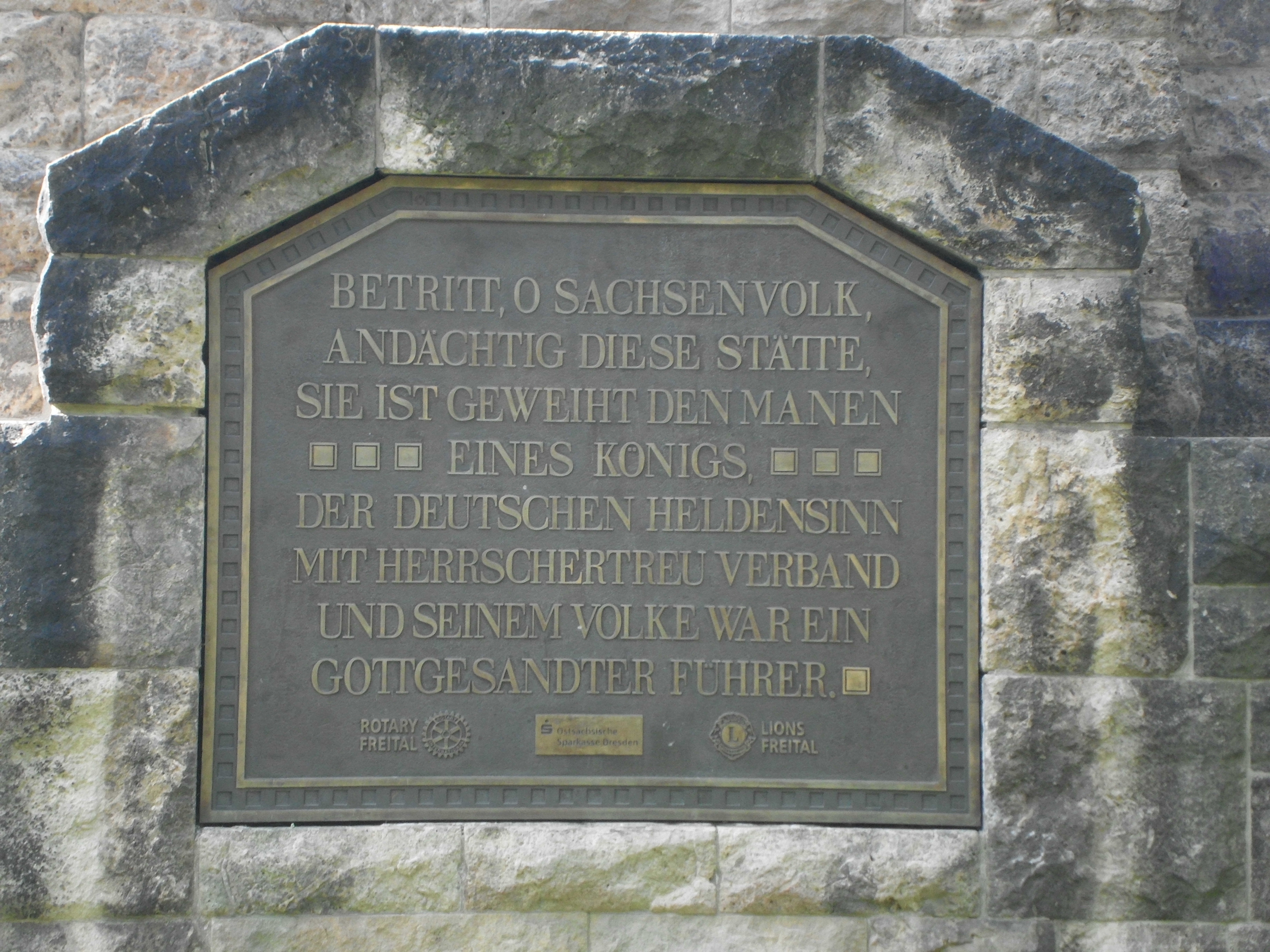 Inschrift am König-Albert-Denkmal auf dem Windberg in Freital